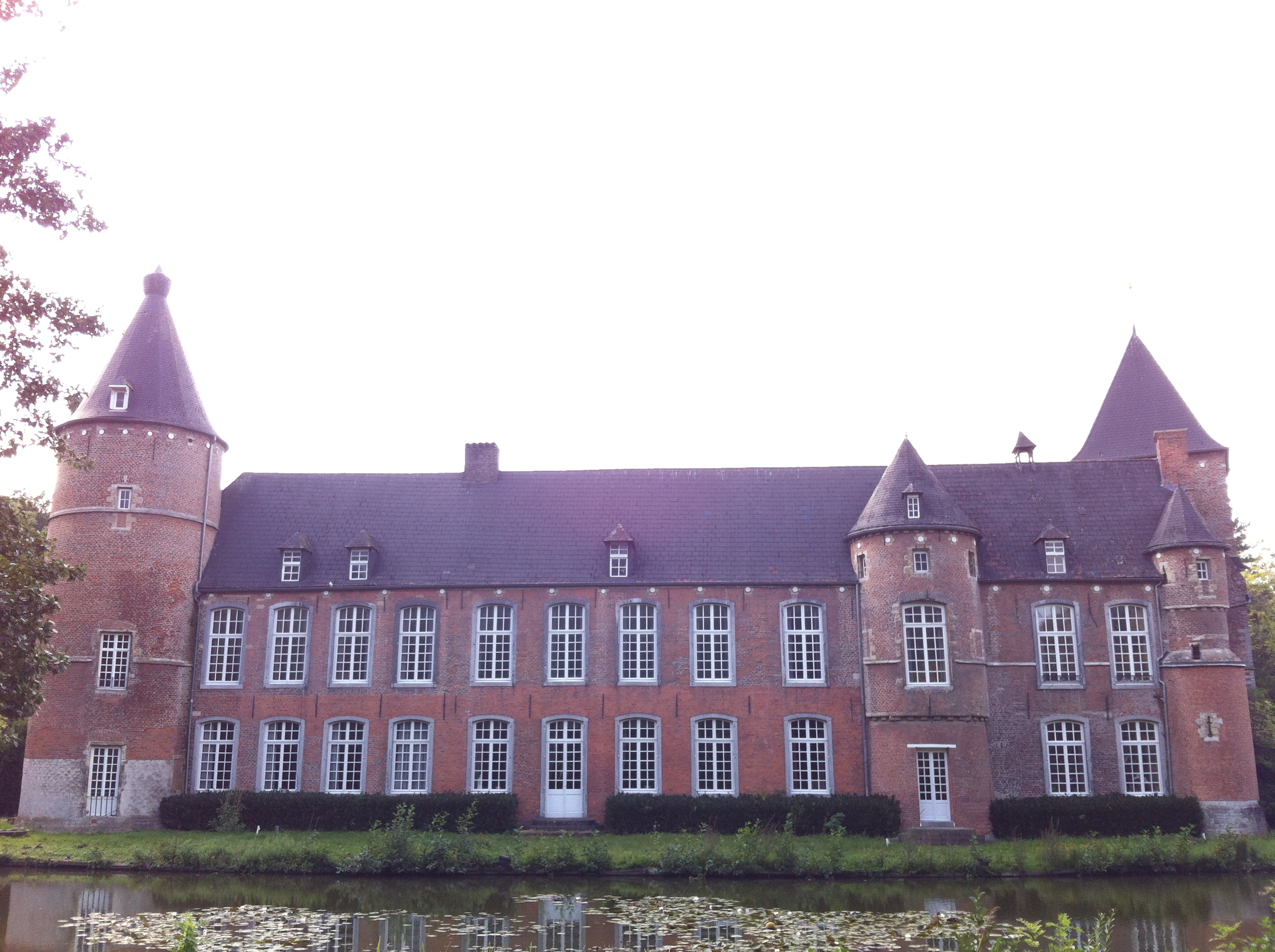 Kasteel Kruikenburg, Statiestraat 37, Ternat